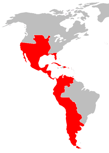 Imperio español en América en 1789 tras la guerra de Independencia de los Estados Unidos en 1785. Tras esta guerra España consiguió de los británicos muchos territorios que antes habían sido anexionados a España, como la Florida, toda la costa de los Mosquitos y las islas de la Bahía, así comola conquista de Bahamas, Montserrat y Granada, pero estas fueron devueltas a Gran Bretaña por el tratado de París.